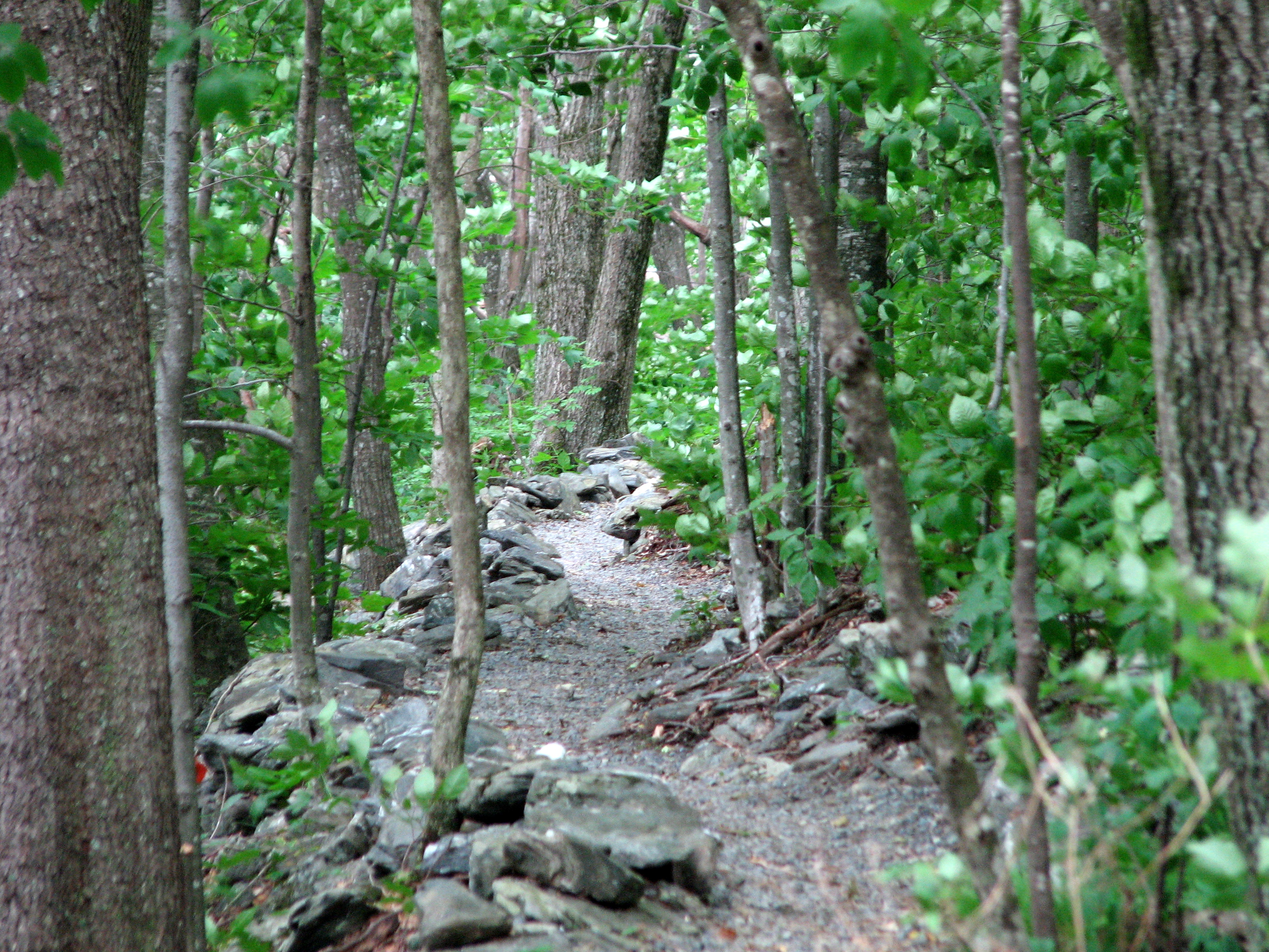 Hiking trail at Elk Knob State Park